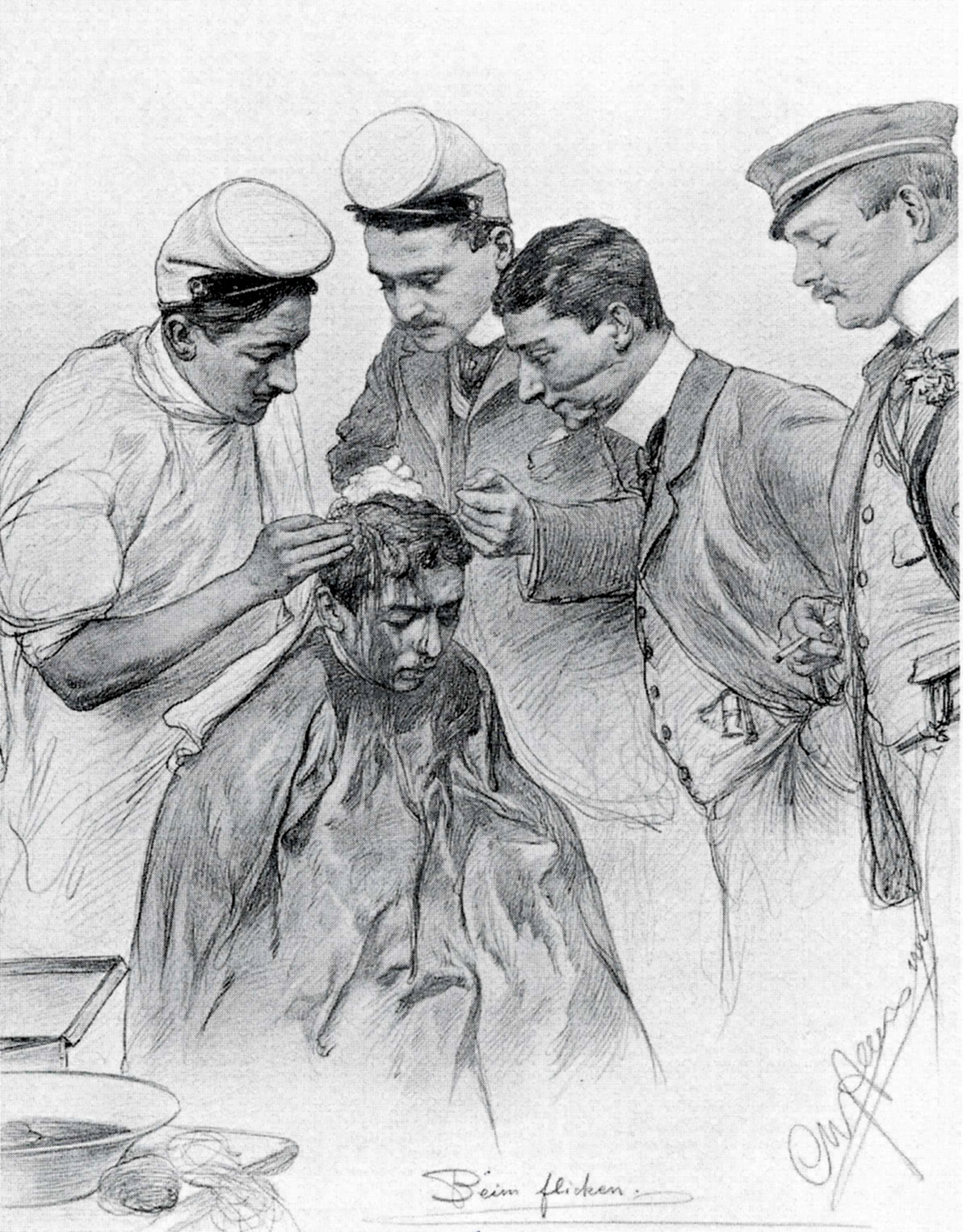 Christian Wilhelm Allers († 19. Oktober 1915), "Beim flicken", Zeichnung von 1902. Zur Identifizierung der abgebildeten Personen siehe Nachdruck des Corpsleben von Hans-Reinhard Koch von 2016 (ISBN 978-3-9815935-4-9) Seite 103f.